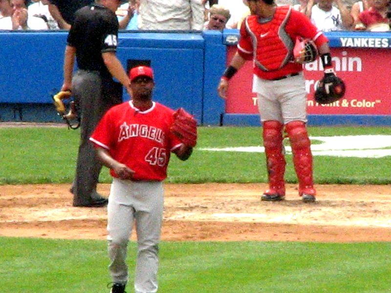 Kelvim Escobar